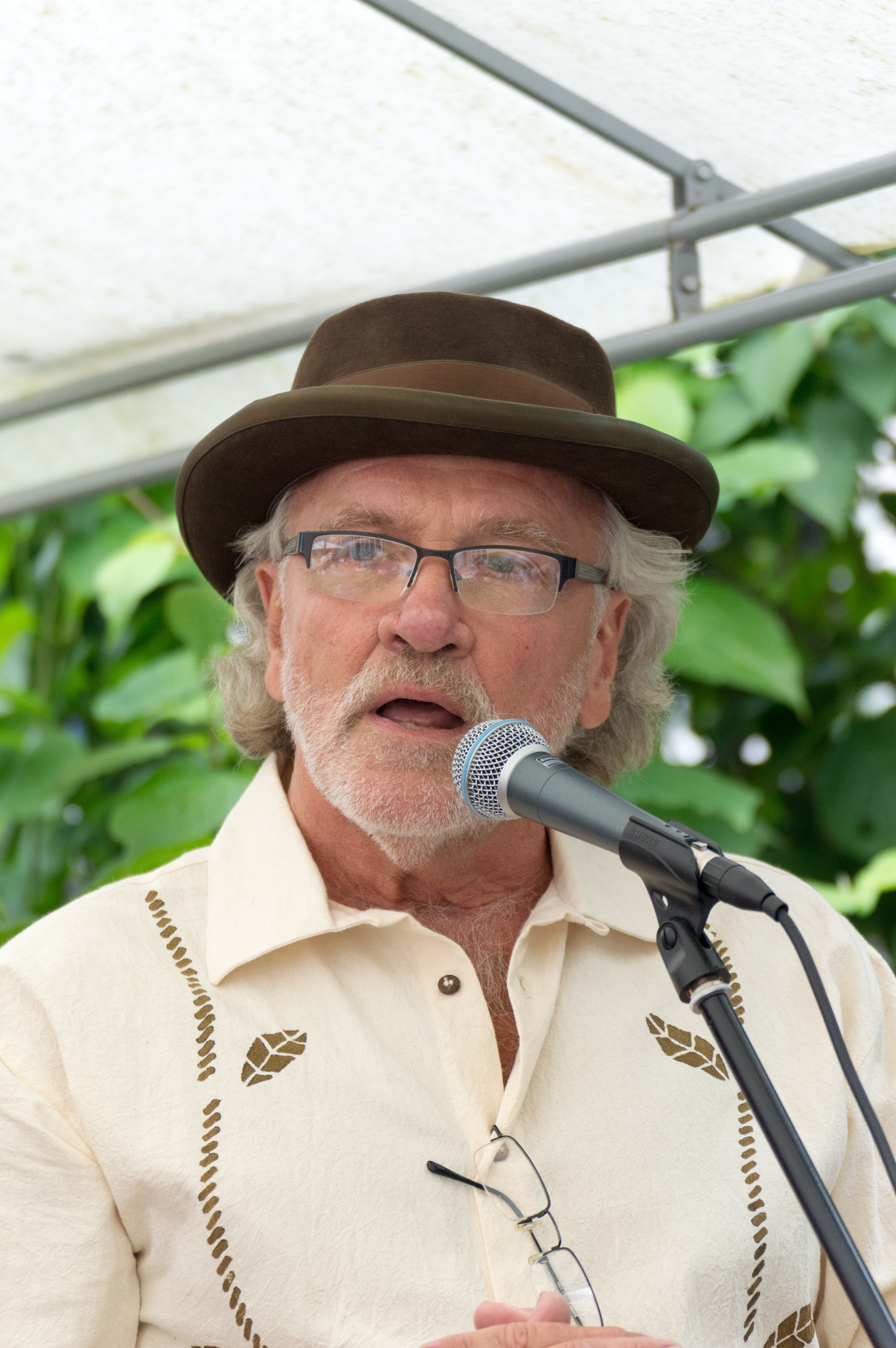 Håkan Streng, suomalainen laulaja